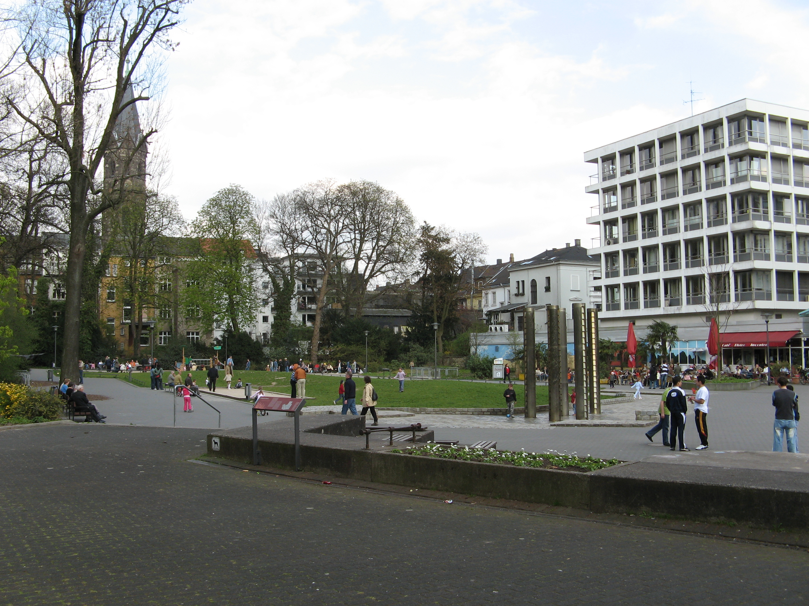 Der Deweerth'scher Garten ist eine über 200 Jahre alte, kleine innerstädtische Parkanlage im Wuppertaler Stadtteil Elberfeld